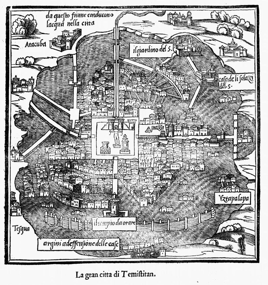 "La gran citta di Temistitan (Tenochtitlan)" Vea la imagen en su contexto Datos bibliográficos: Título / Autor: Isolario di Benedetto Bordone nel qual si ragiona di tutte l'Isole del mondo... / con la gionta del Monte de Oro novamente ritrovato ; con il breve del Papa Más detalles: PUBLICACIÓN Vinegia : per Nicolo d'Aristotile, detto Zoppino, [1534] DESCR. FÍSICA [10], LXXIIII: il. , Fol NOTA A PUBLIC. Pie de imp. tomado de colofón DESCR. FÍSICA Sign.: 2A4, 2B2-2D2, A-D6, E4, F2, G-M6, N8 ILUSTRACIONES Múltiples ilustraciones con mapas de islas, ciudades, paises, continentes... Subject Islas -- Mapas -- Obras anteriores a 1800 OTRO AUTOR Zoppino, Niccolo CLASIF. ABREV. 913 LUGAR IMPRES. Italia Venecia Signatura: A Res.28/2/07 Localización: Catálogo Fama